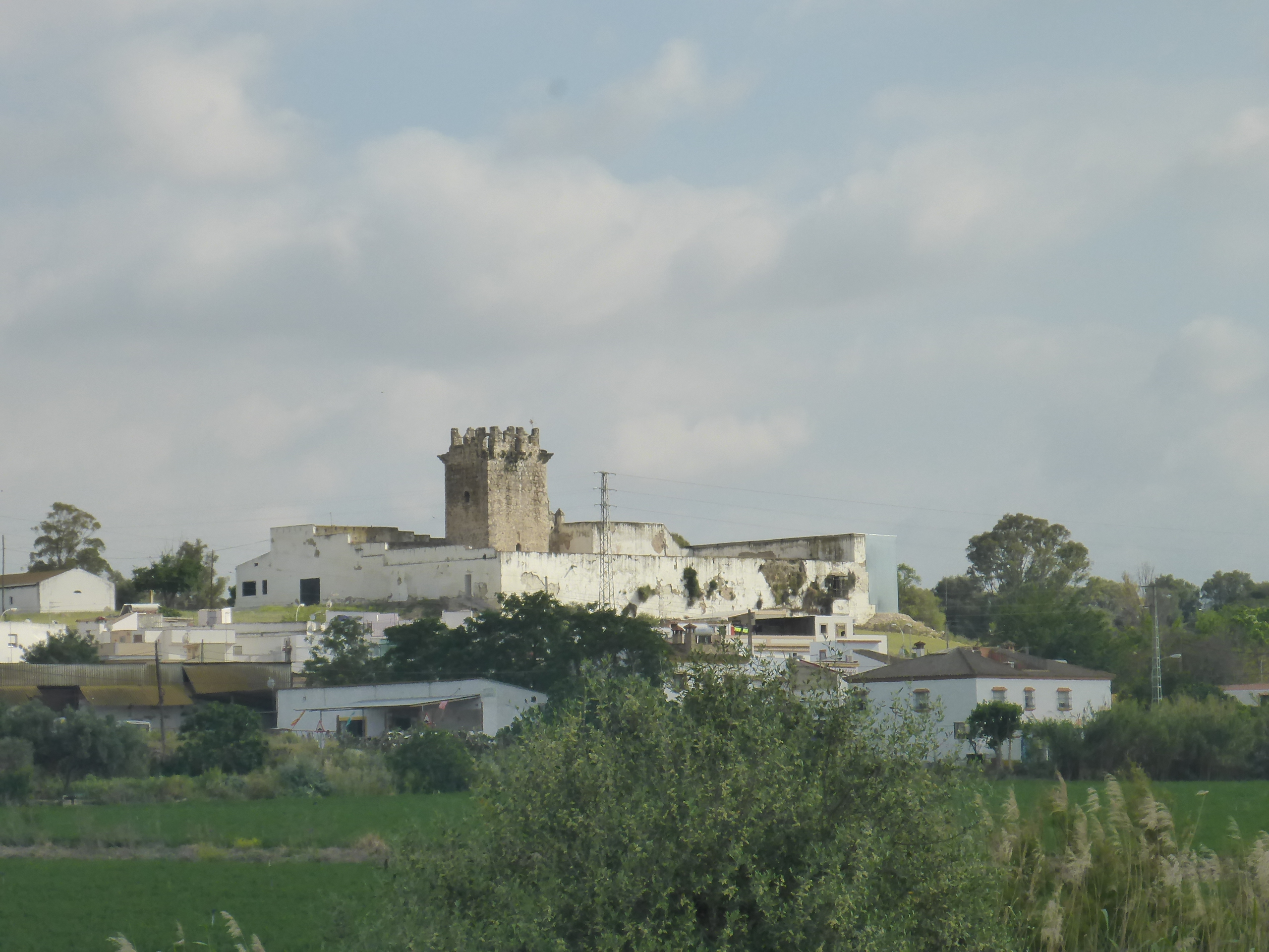 Castillo de Torre Melgarejo con estructura de chapa en la esquina del derrumbe